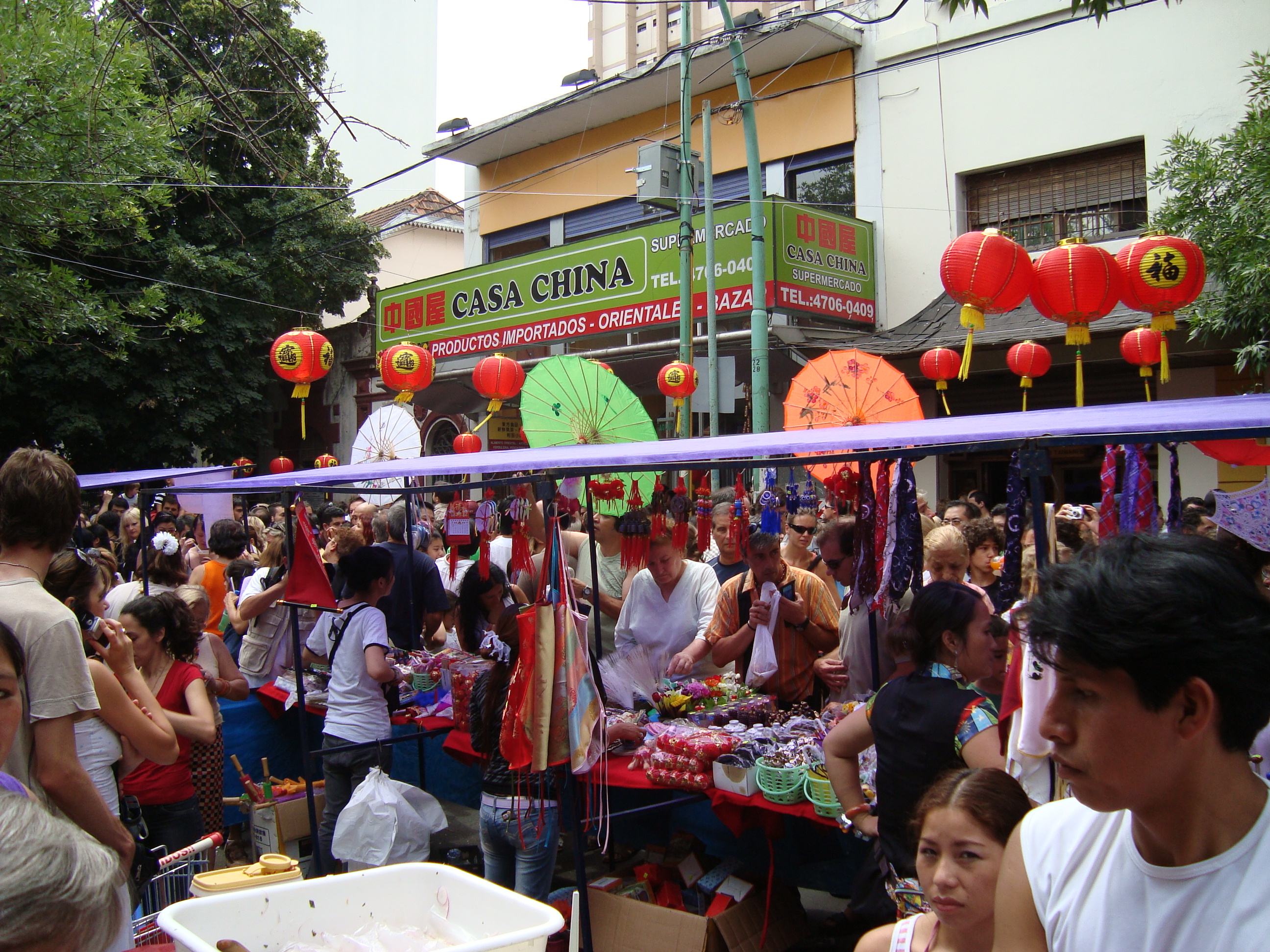 Festejo de año nuevo chino en el "Barrio Chino" en Belgrano, Buenos Aires.